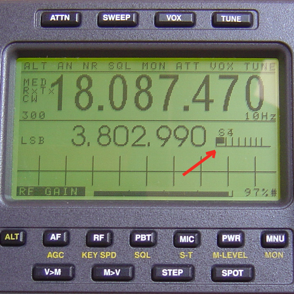 S-metre Bargraphe récepteur Ten Tec Jupiter